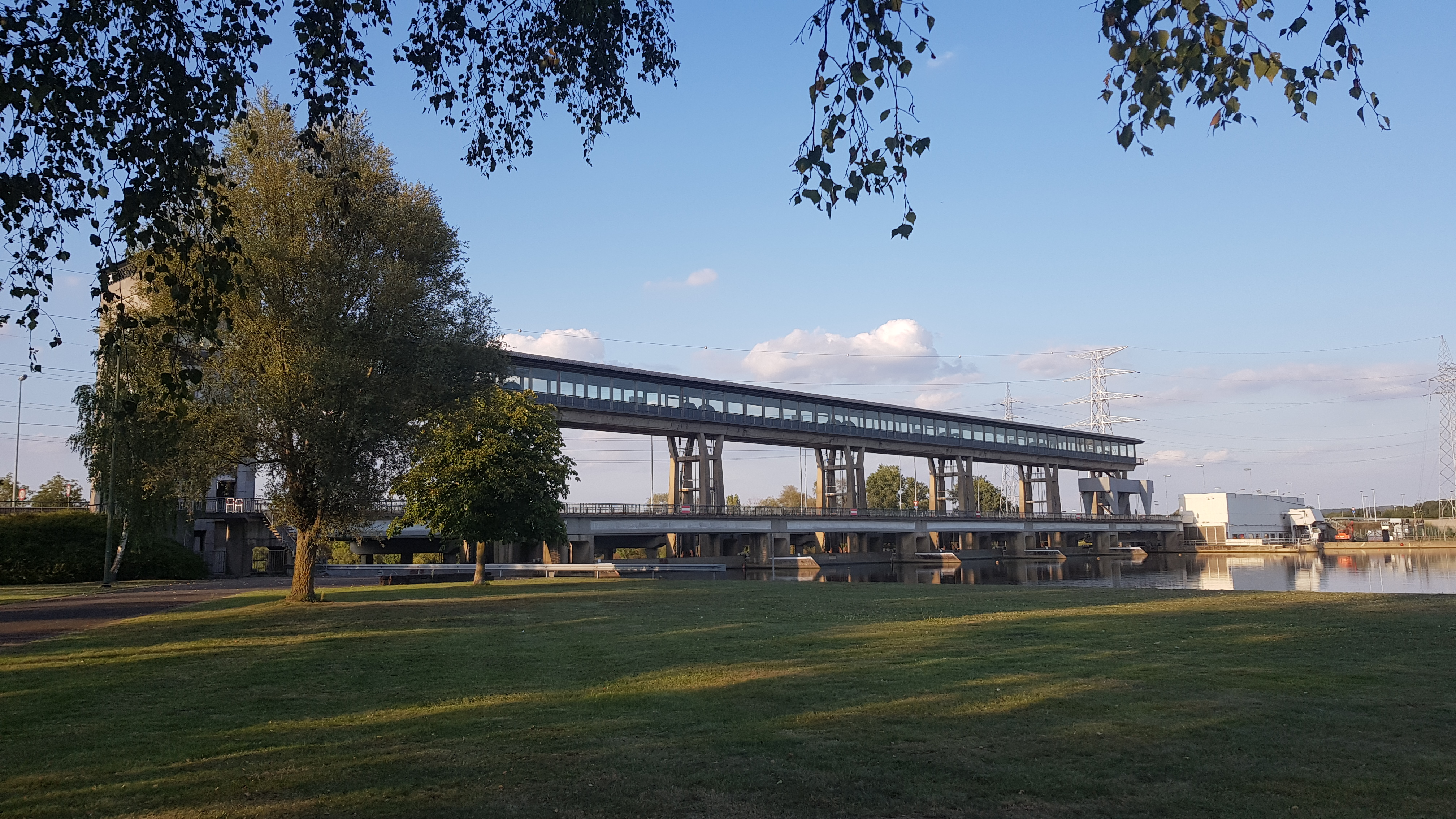 Barrage de Lixhe, Visé, Belgique